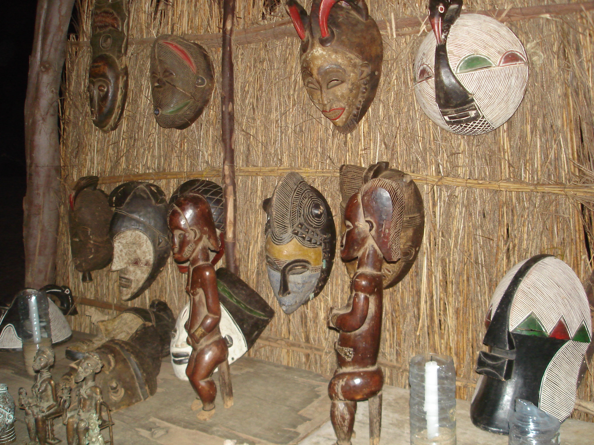 Masques africains en teck ou en acajou. Auteur : Jean-Claude Perez